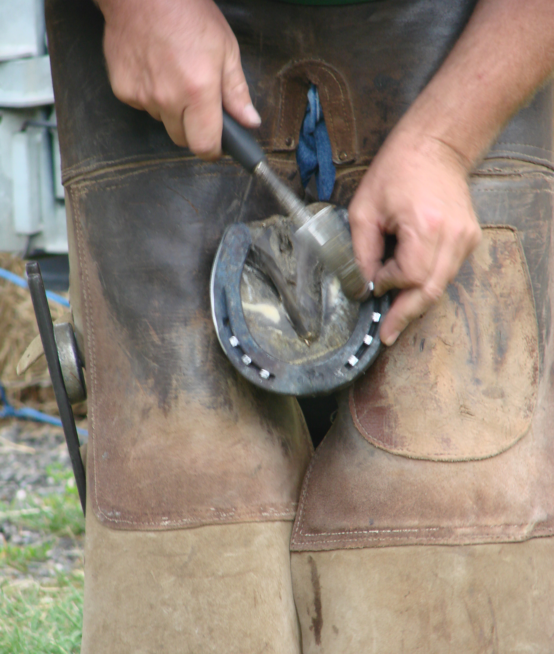 Les clous sont posés en partant du milieu et en procédant alternativement de chaque côté.